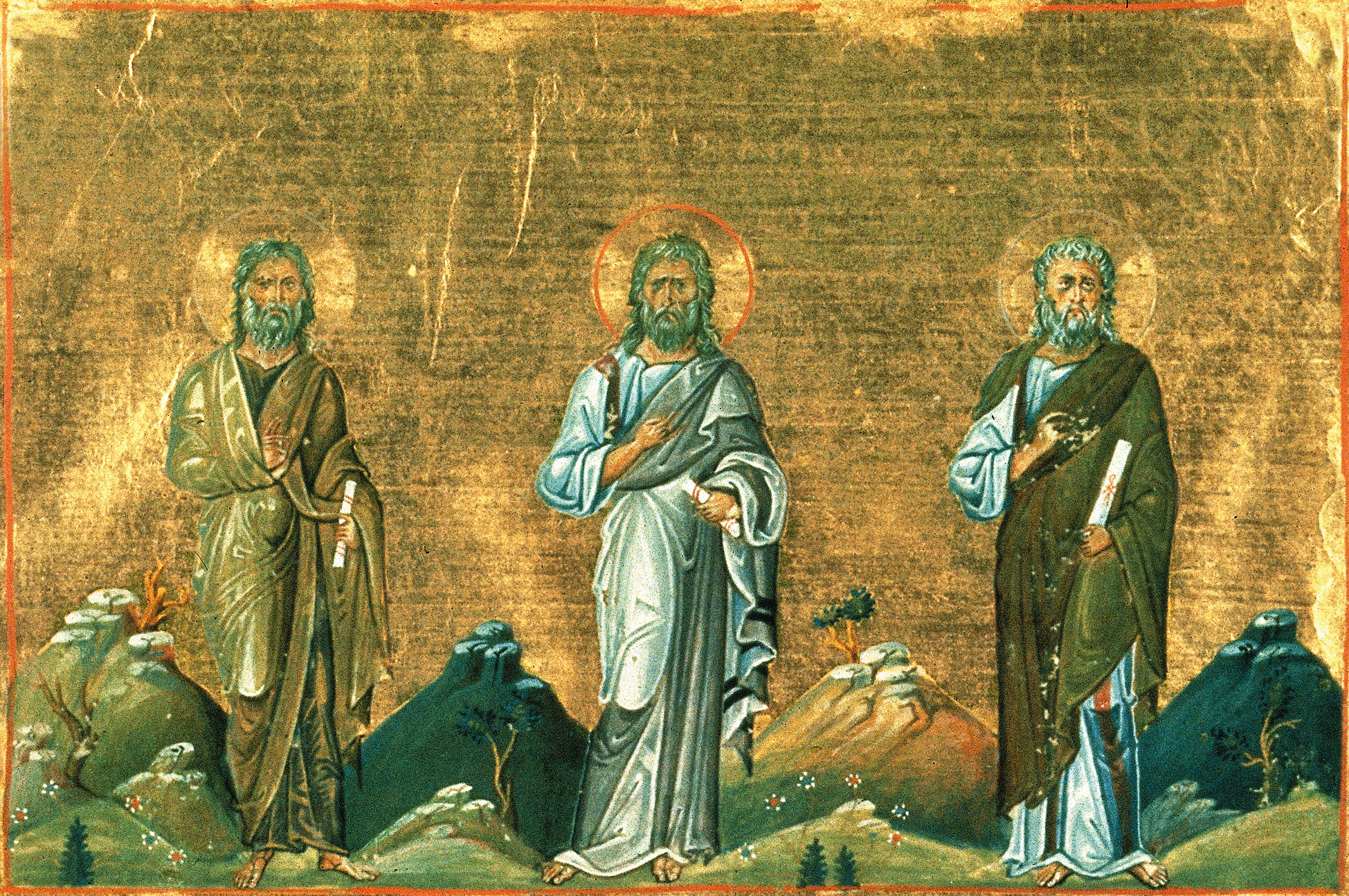 Неделя святых праотец